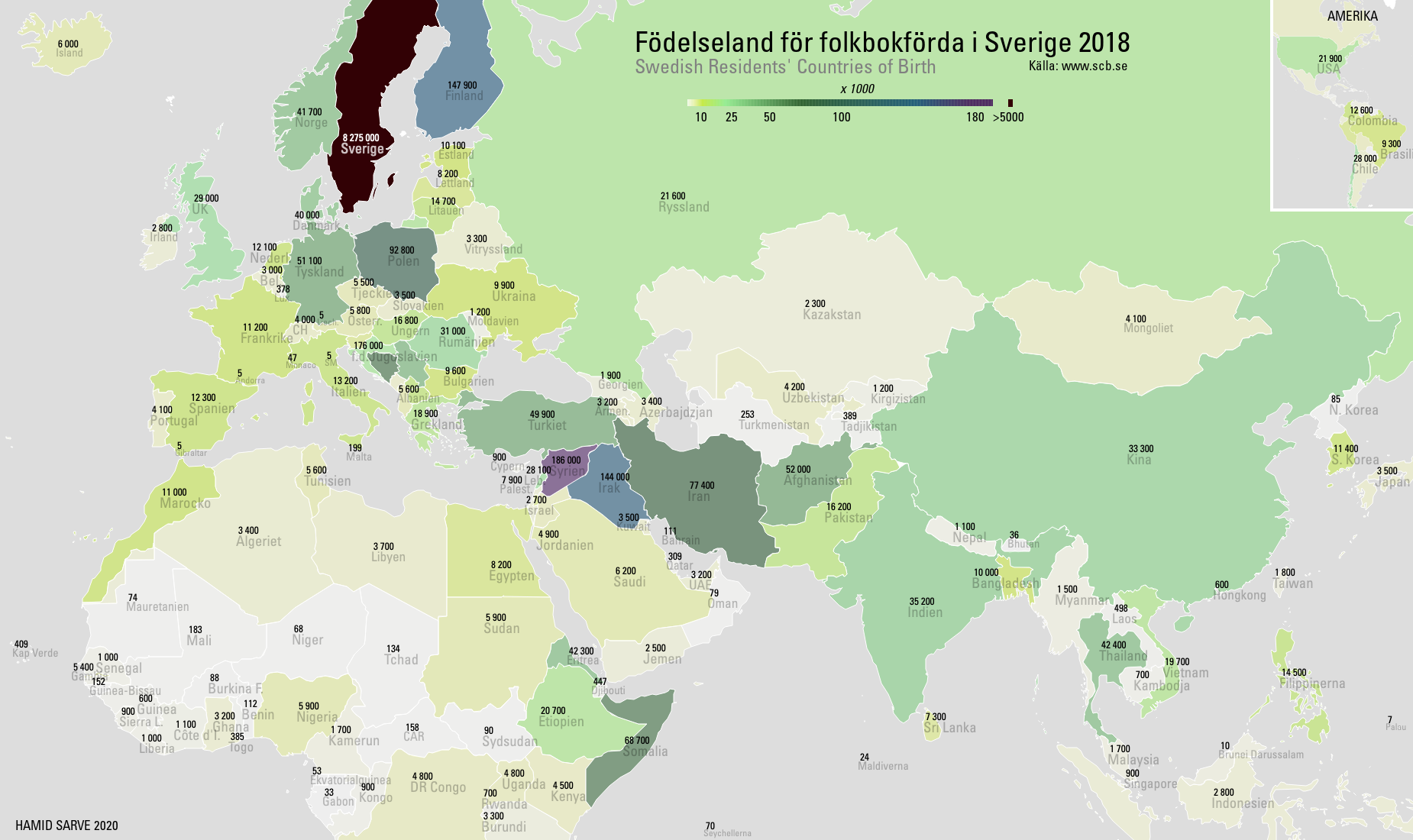 Födelseland för folkbokförda i Sverige 2018